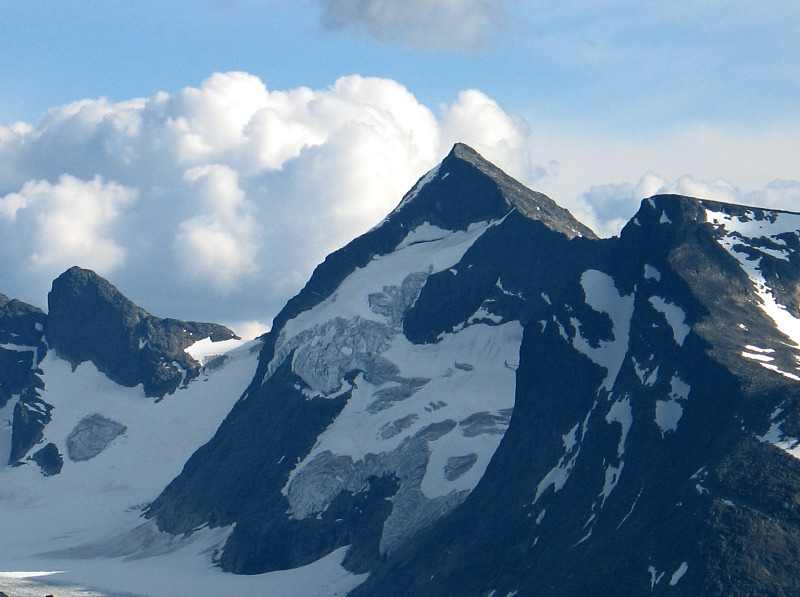 Store Knutsholdstinden sett fra nord, fra Raudhamran ved Surtningssui. Foto: Tore Røraas / Marianne Gjørv.